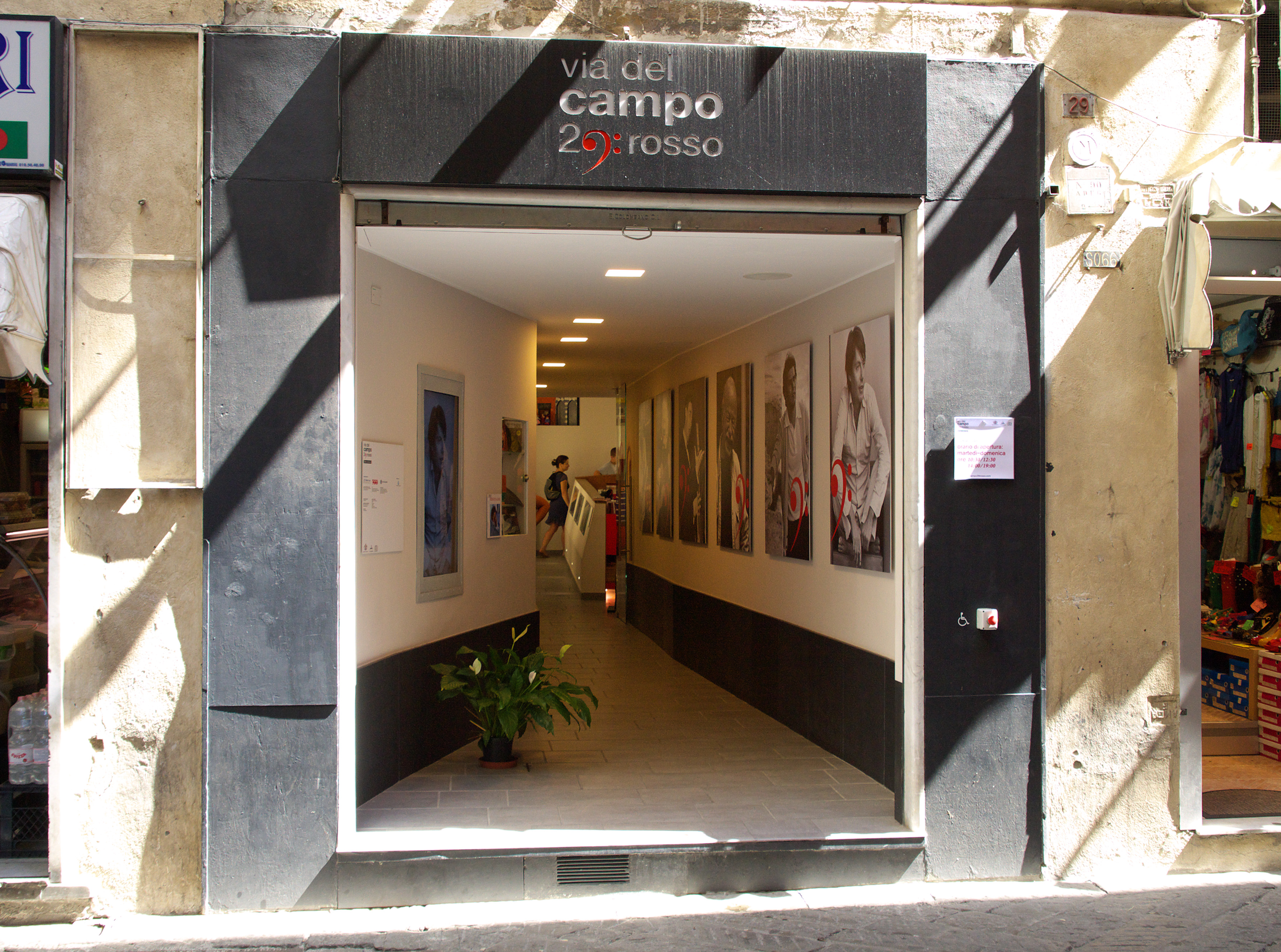 Via del Campo 29r – Emporio museo musicale This is a photo of a monument which is part of cultural heritage of Italy.